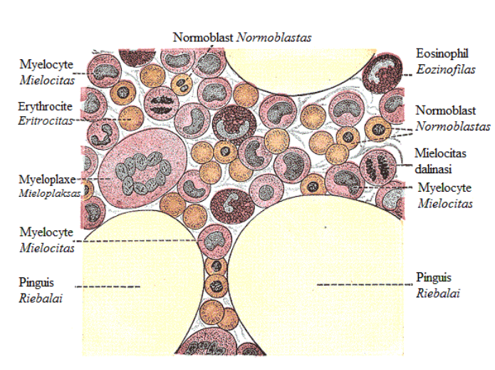 Žmogaus kaulų čiulpų nuotrauka